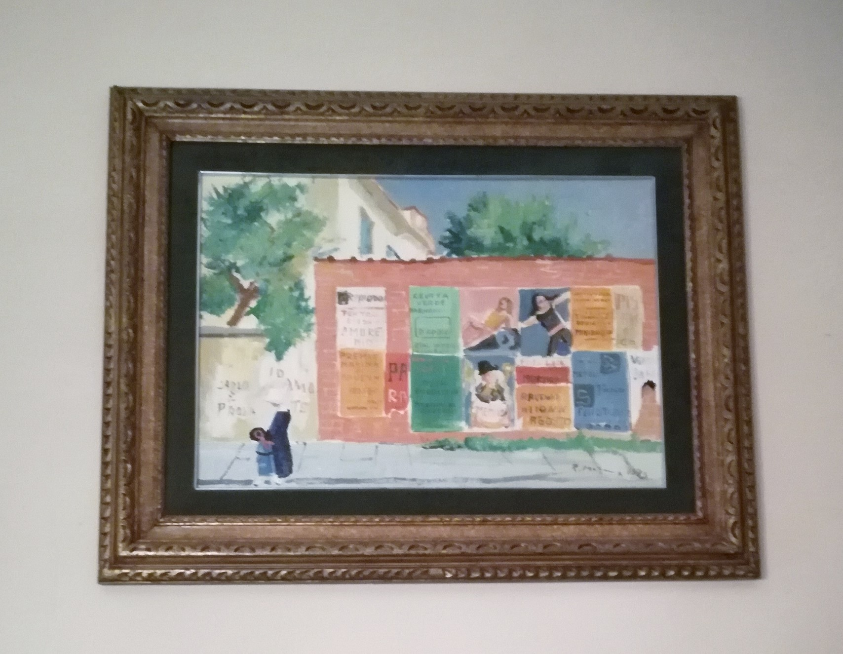 Mostra collettiva presso la pergola arte un opera di Rodolfo Marma